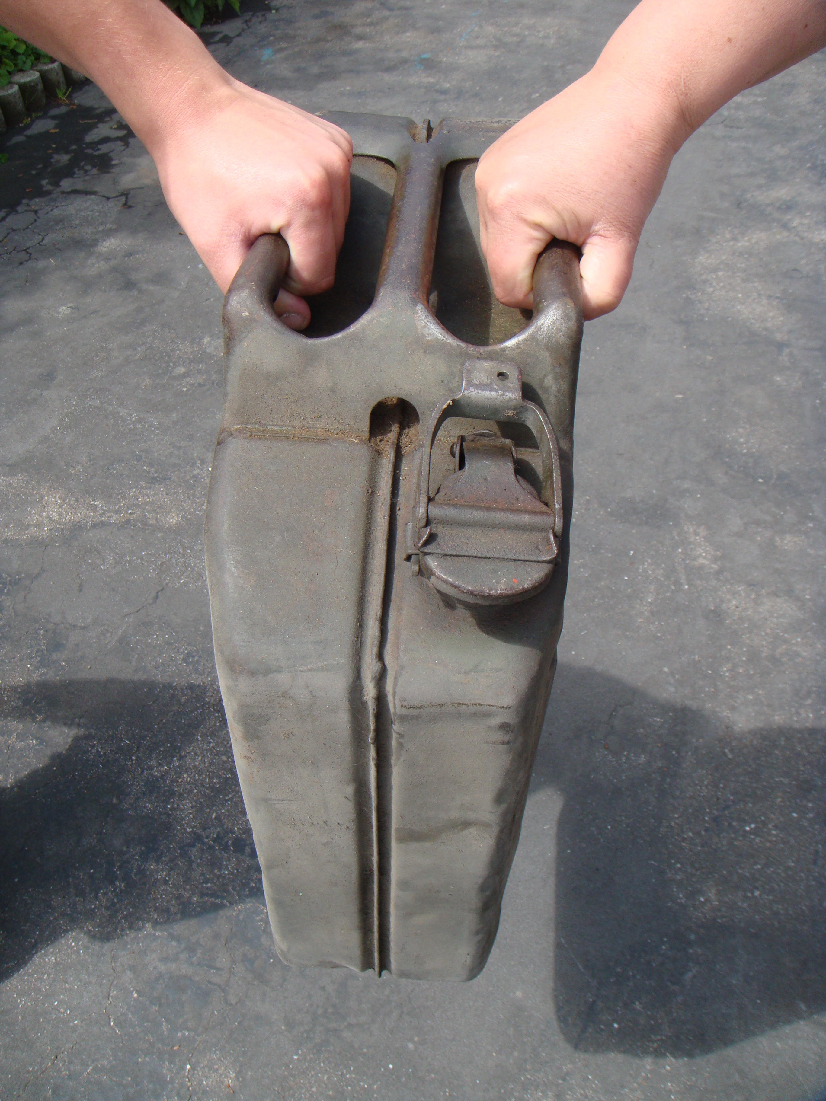 Jerrycan Zweimann Tragweise